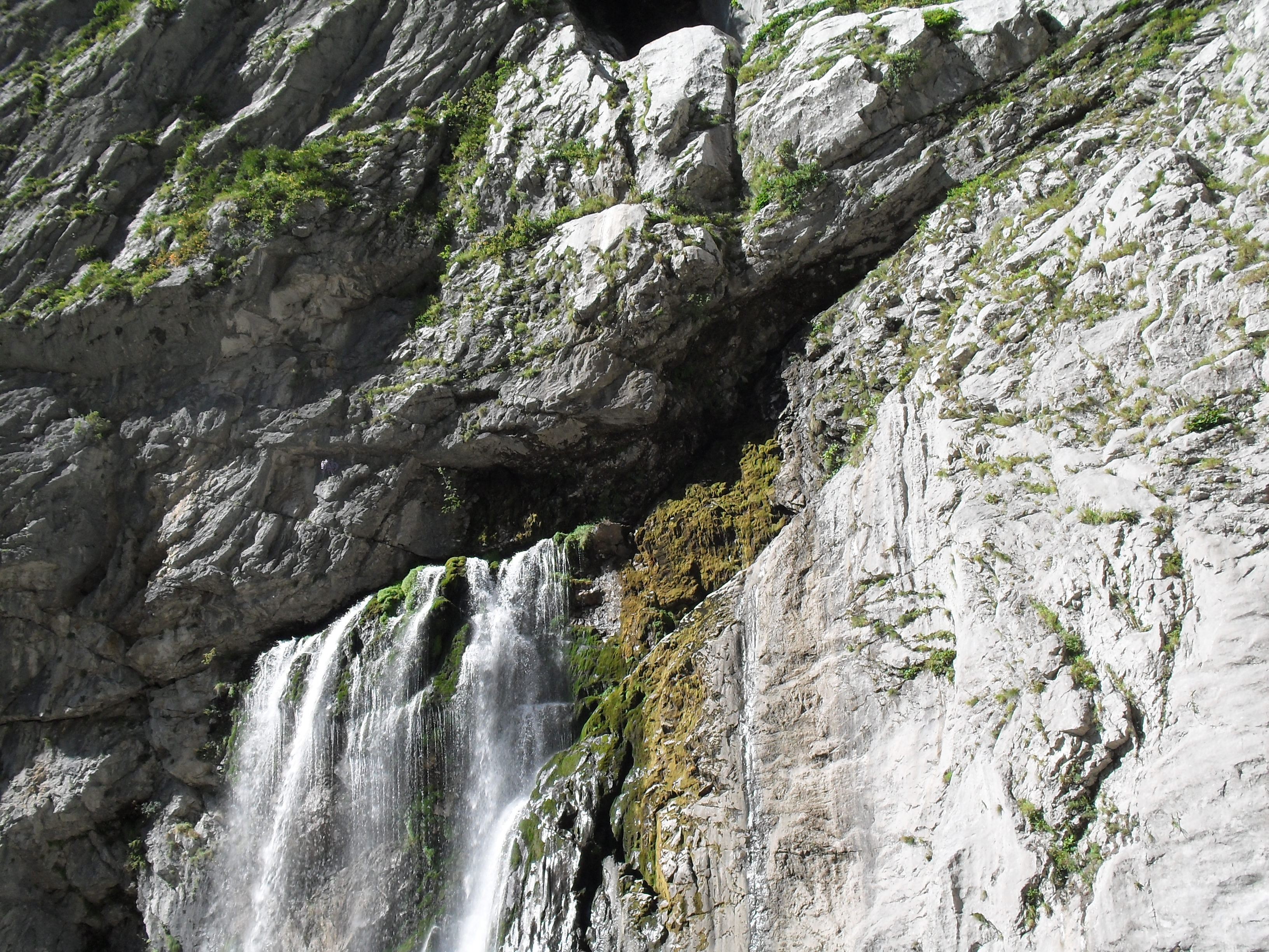 Абхазия. Гегский водопад над входом в пещеру Черкесский водопад